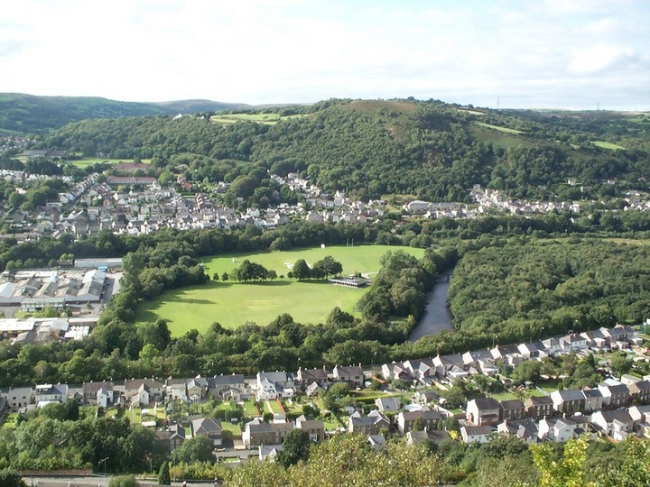 Панорамен изглед от Понтардауе